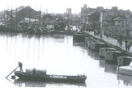 宁波新江桥浮桥